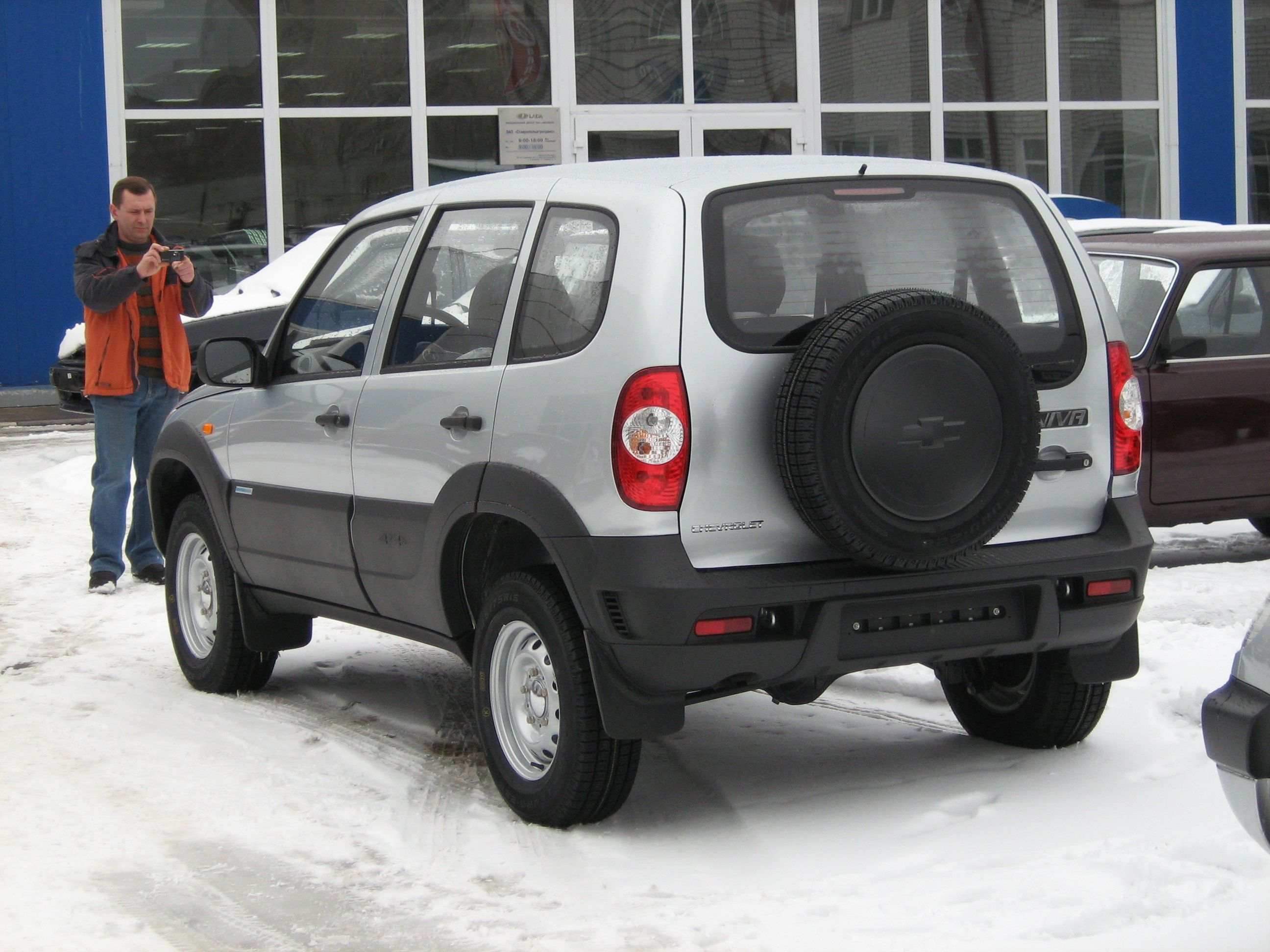 Рестайлинговая Шевроле Нива, вид сзади